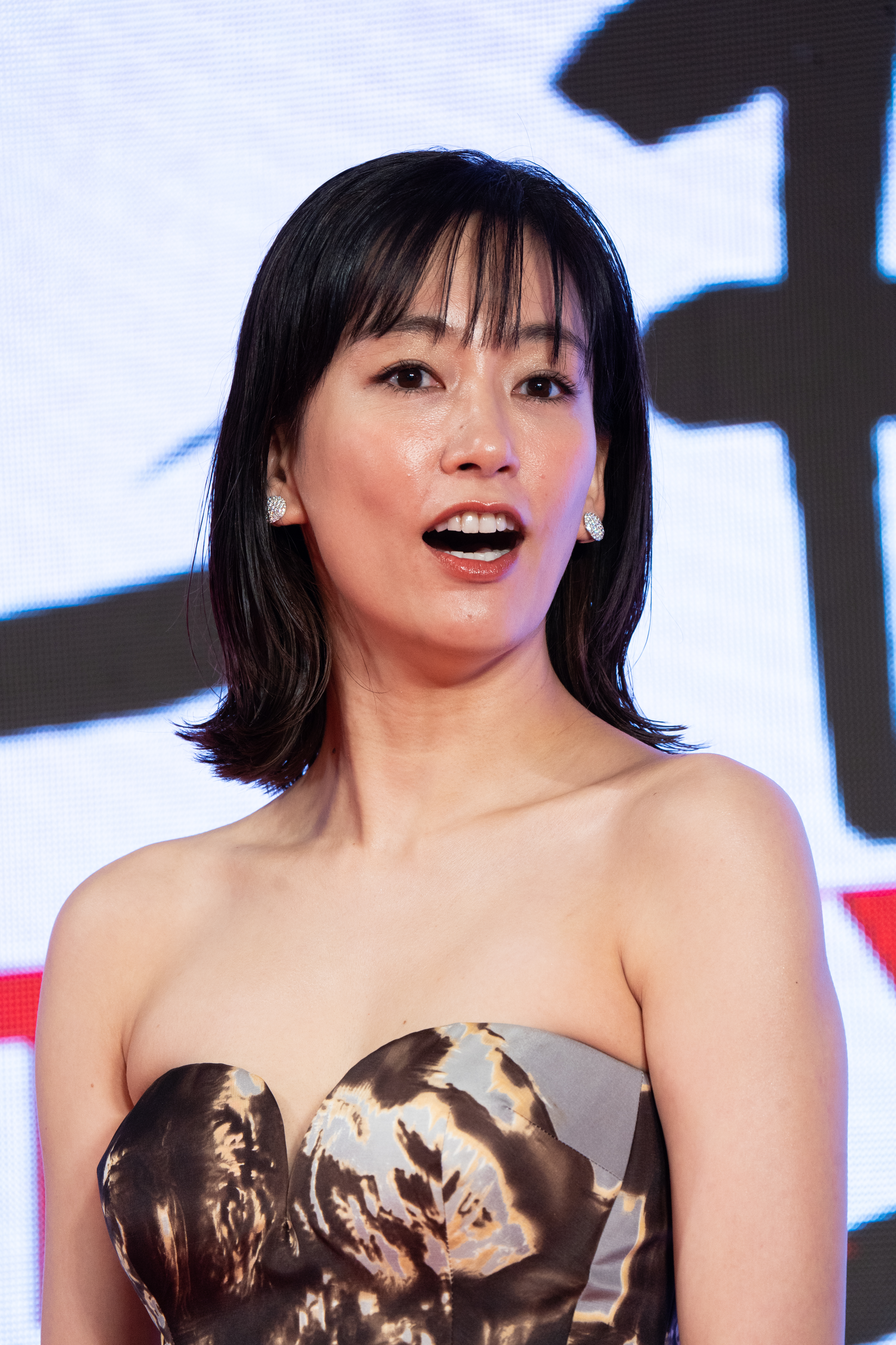 第32回 東京国際映画祭 オープニングセレモニー 水川あさみ (喜劇 愛妻物語)